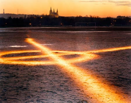 Jan Pohribný: Letná, fotografické dílo